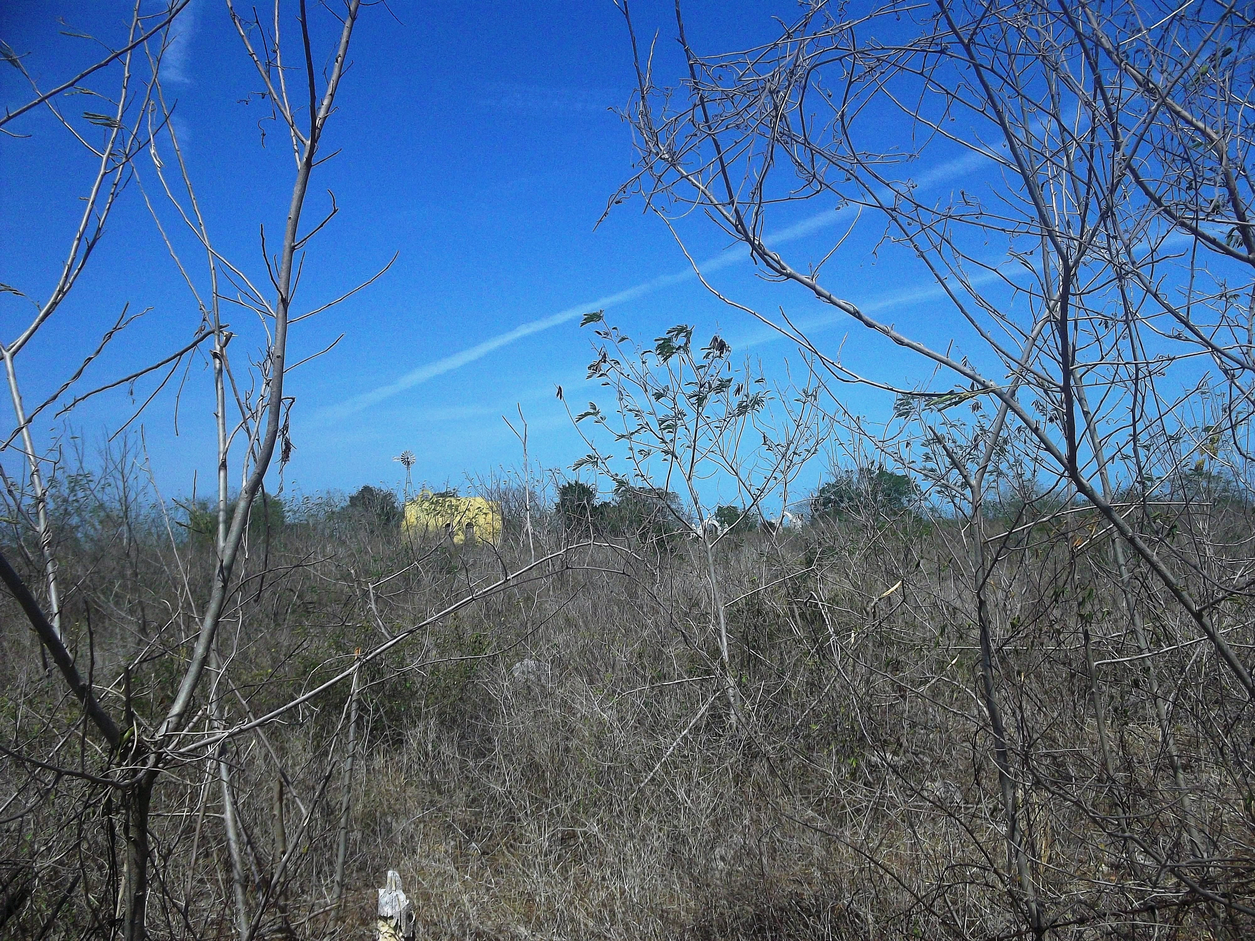 Vista de la hacienda Xitibcanul, Yucatán.